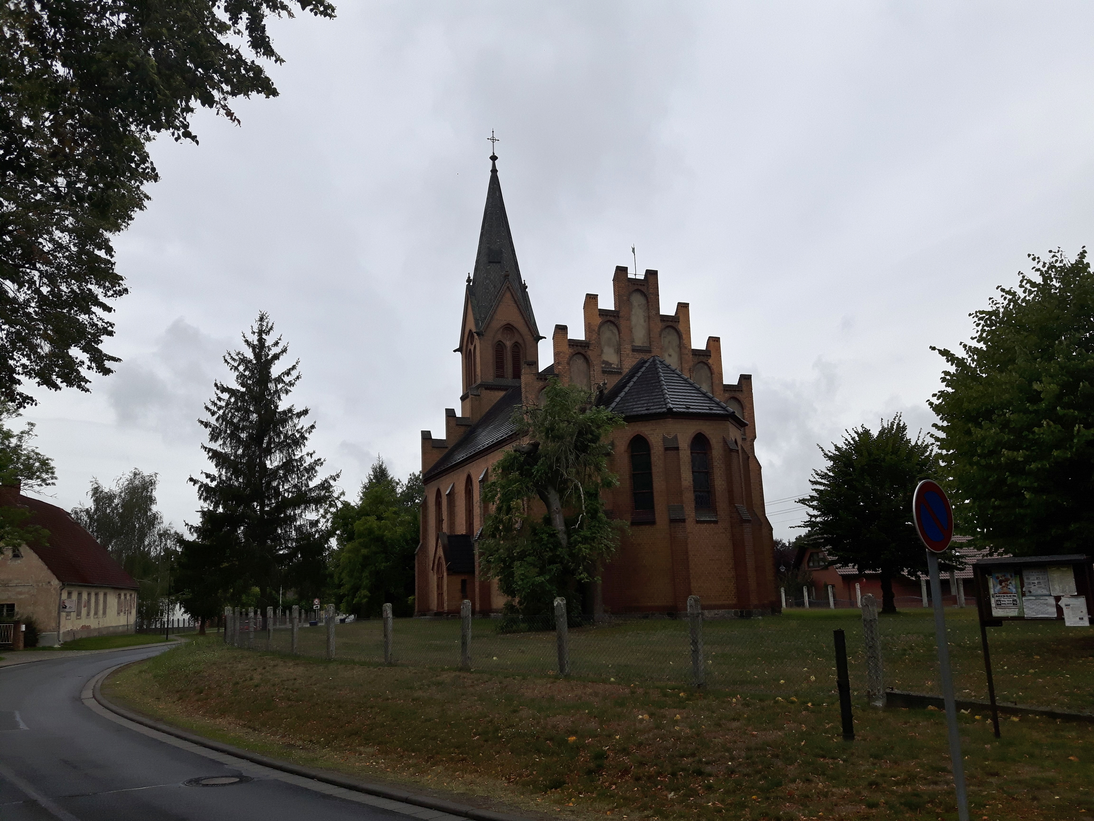 Dorfkirche Missen bei Vetschau in Brandenburg.